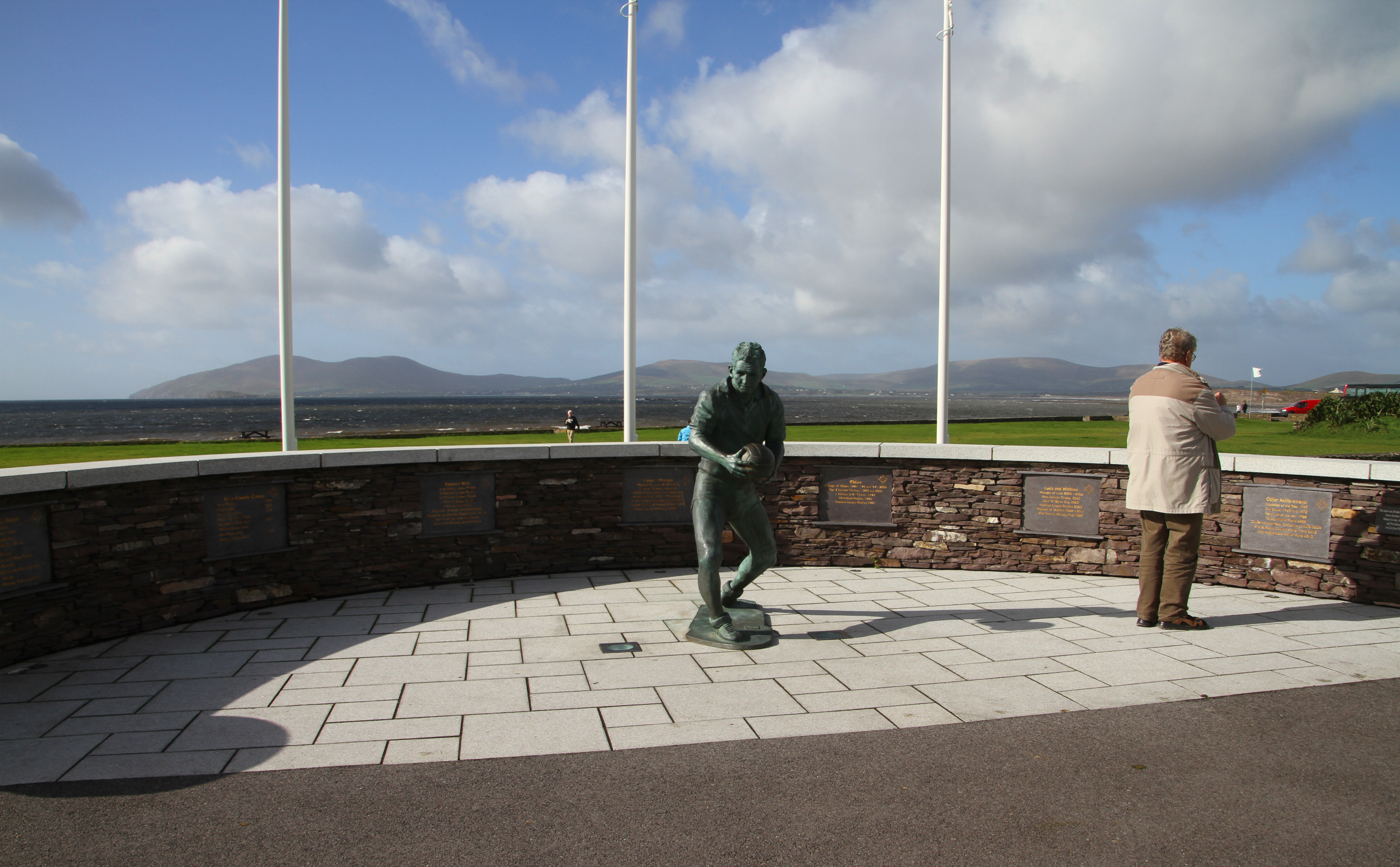 Waterville, County Kerry